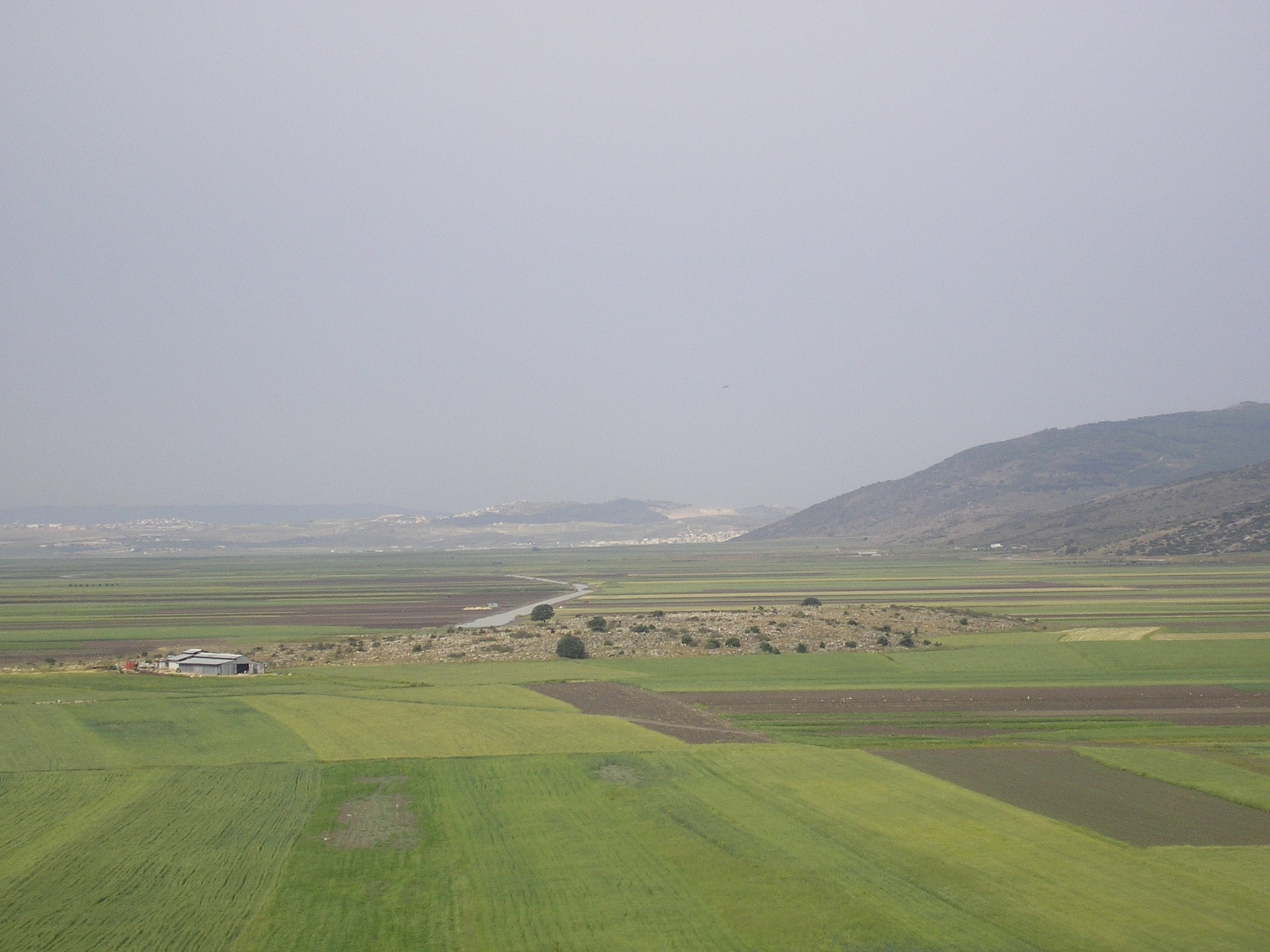 המוביל הארצי בדרכו דרך בקעת בית נטופה - the national water conduit via Beit Netofa